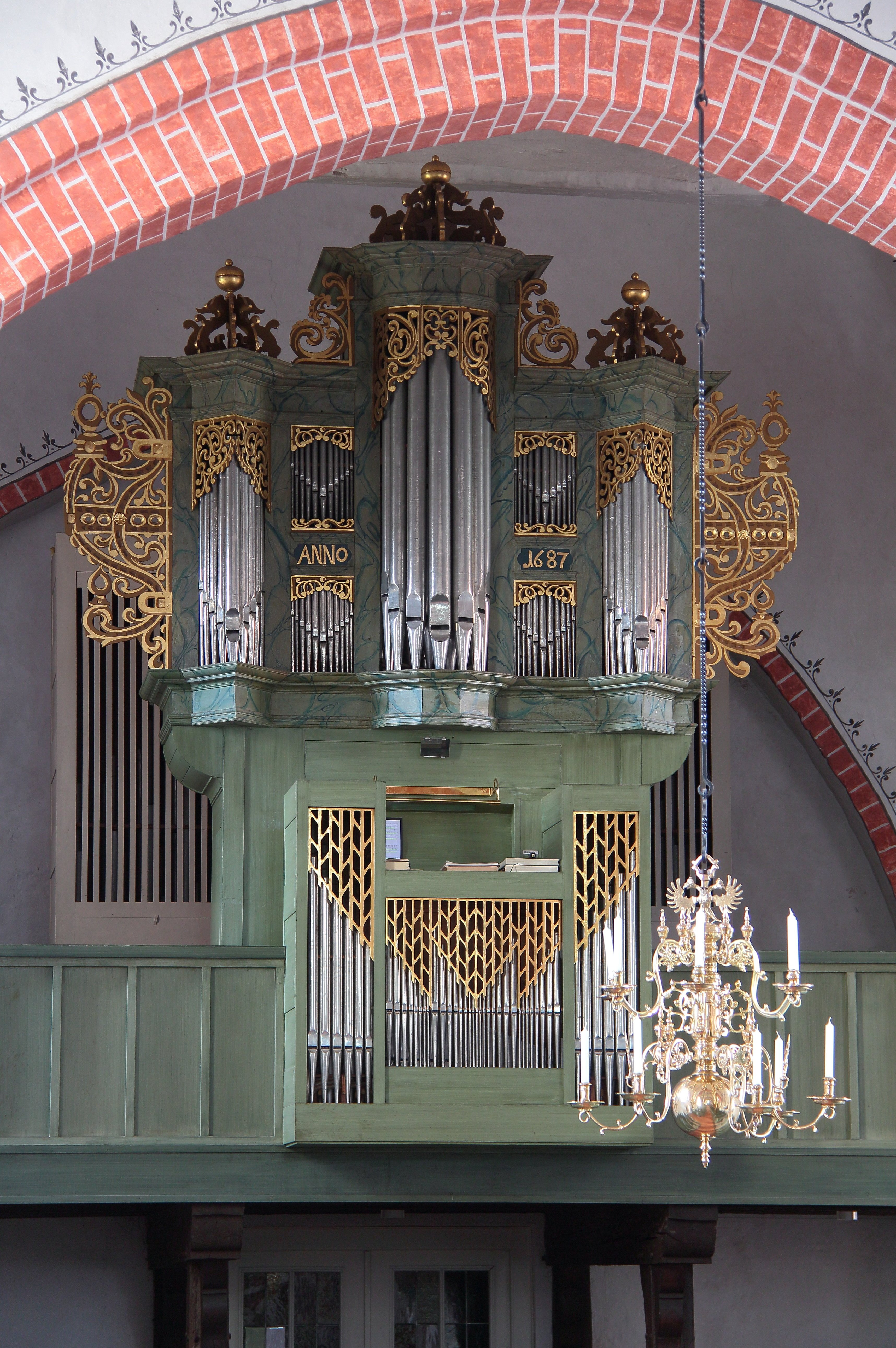 Orgel in St. Petri, Westerstede, Niedersachsen